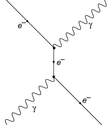 Feynman-Diagramm der Comptonstreuung